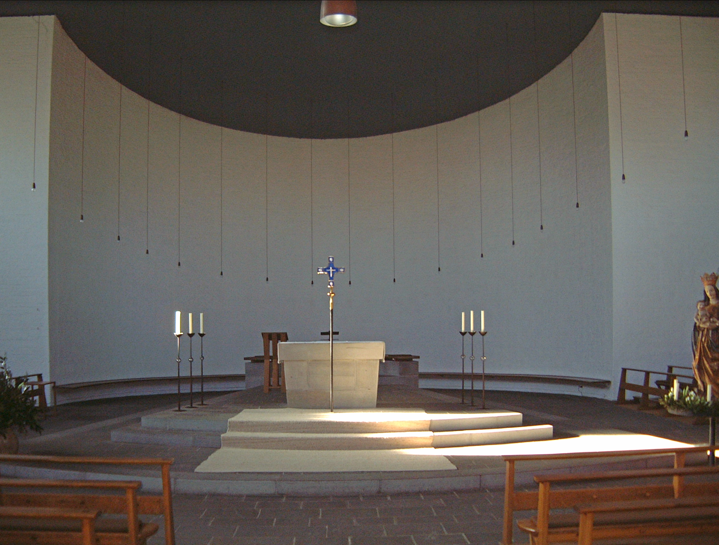 St. Laurentius in Munich-Gern, Bavaria: Interior